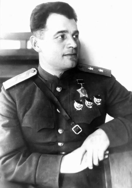 Фотография генерала Ивана Черняховского